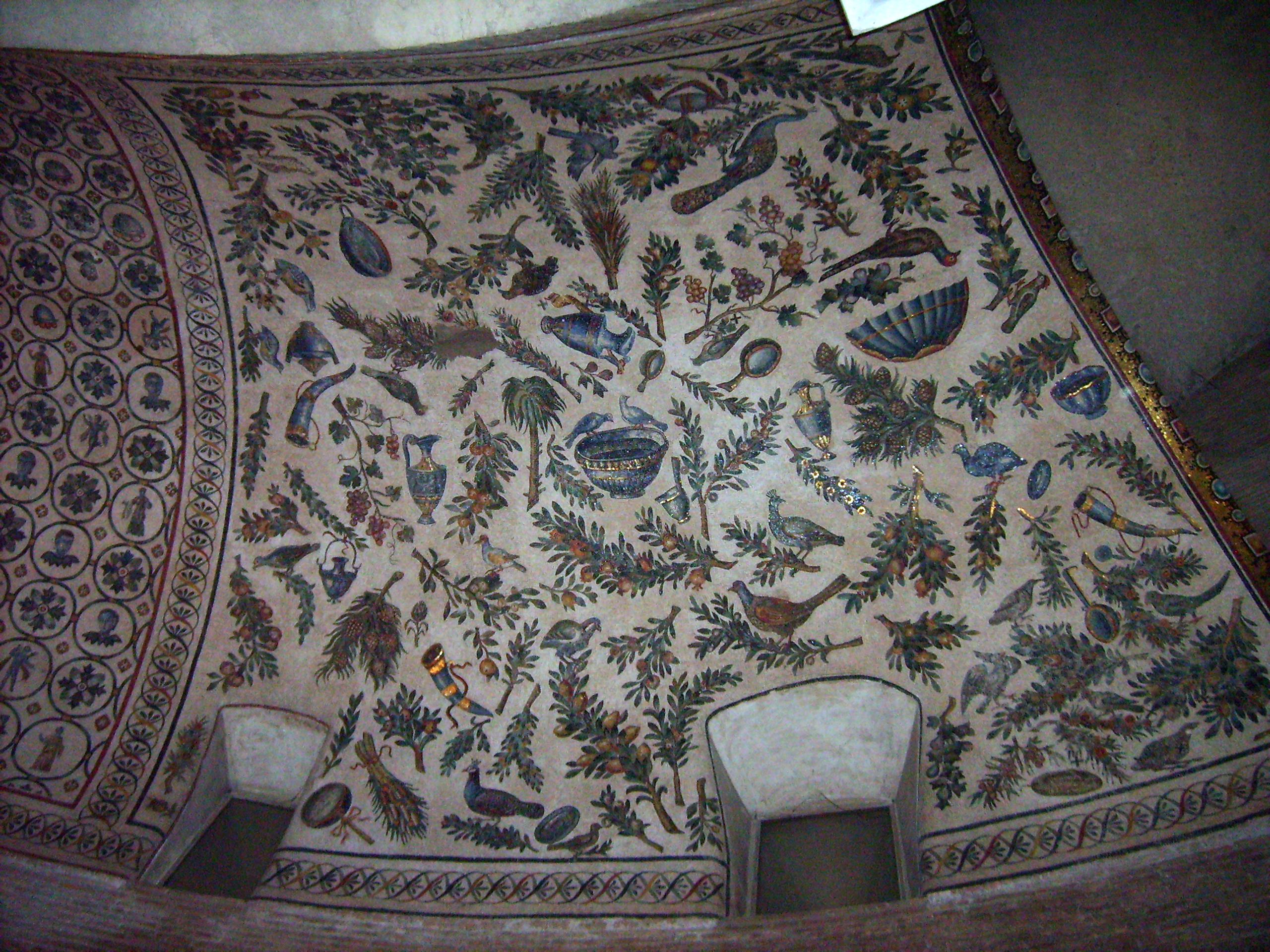 Rome, Italy, Mausoleo di S. Costanza: Mosaic